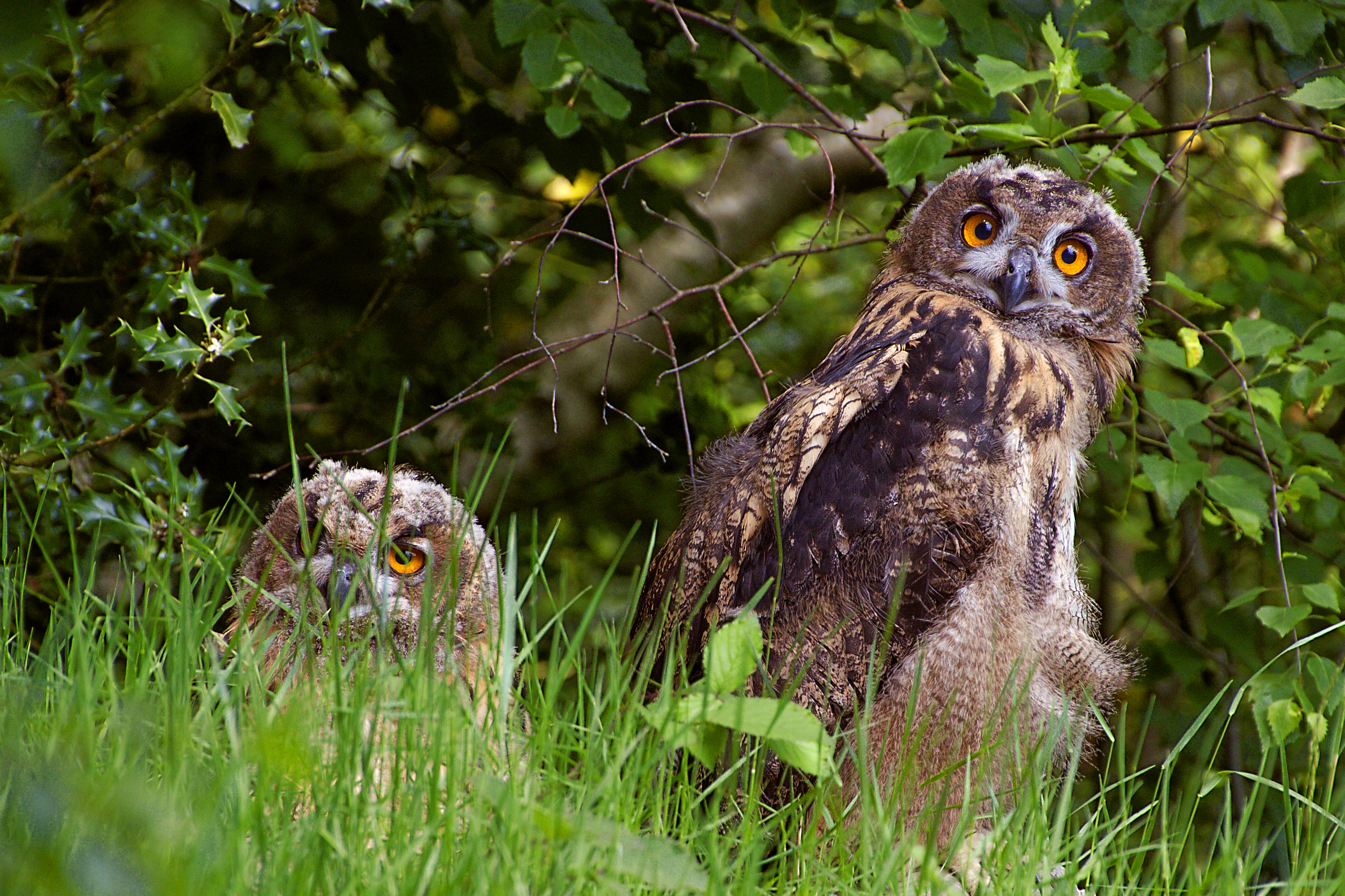 Bubo bubo juveniles